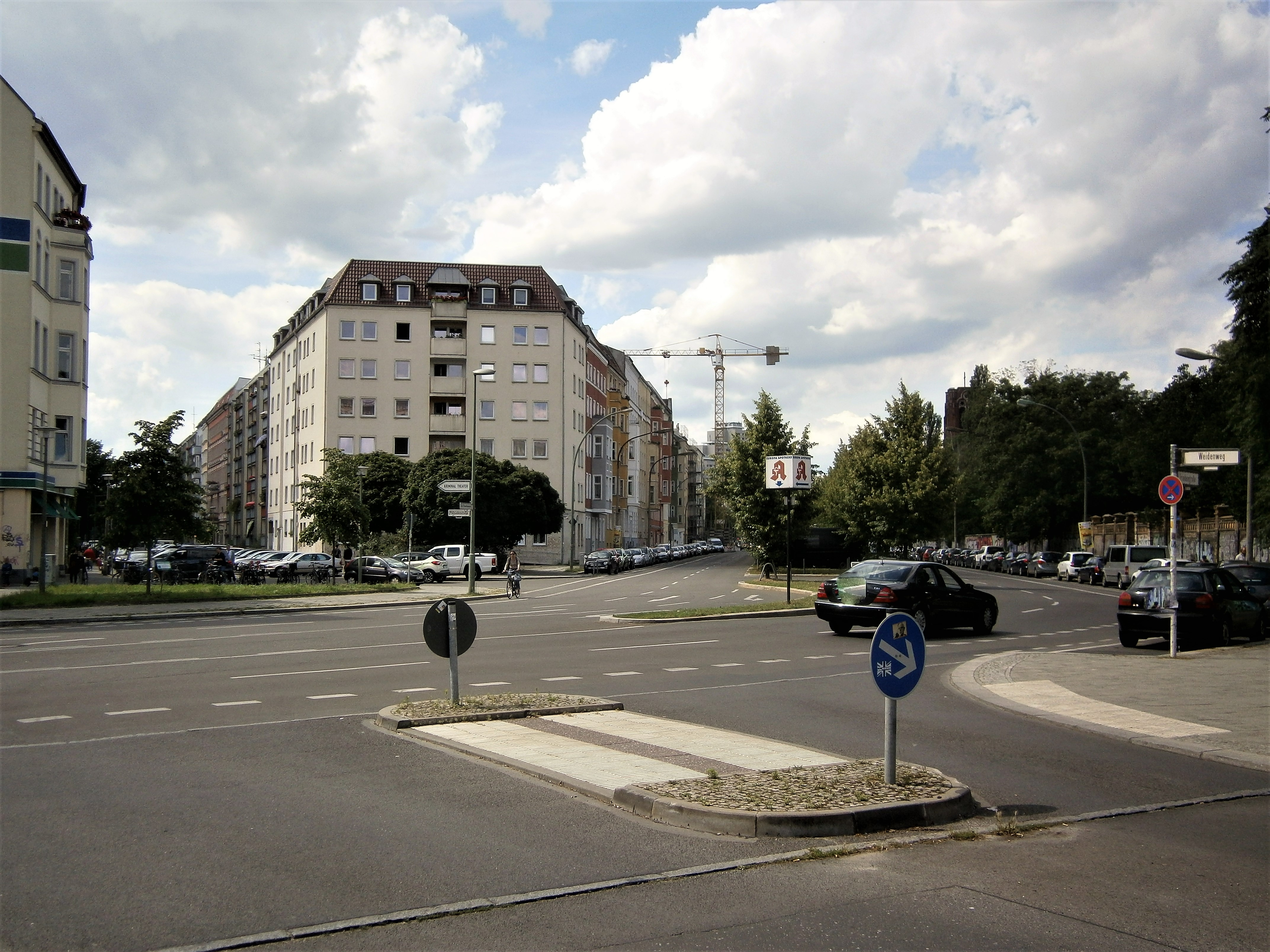 Die Friedenstraße ist eine Straße im Berliner Bezirk Friedrichshain-Kreuzberg, Ortsteil Friedrichshain. Angelegt und benannt wurde sie 1871-1876 auf dem Communicationsweg außerhalb der abgerissenen Berliner Zollmauer. Bereits seit dem Anlegen und der Bebauung bestand eine Teilung der Straße auf Königstadt und Stralauer Viertel. Aktuell sind es drei unterschiedene Straßenabschnitte: regionale Straßenverbindung im Barnimkiez am Volkspark Friedrichshain, am Platz der Vereinten Nationen als Parkzone, südlich im (Planungsraum) "Friedenstraße" als Ergänzungsstraße. Blick von Ecke Weidenweg zu den beiden Fahrbahnen der Friedenstaße und links im Bild Palisadenstraße.